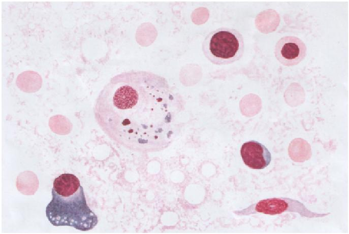 Аплазия кезіндегі сүйек миы